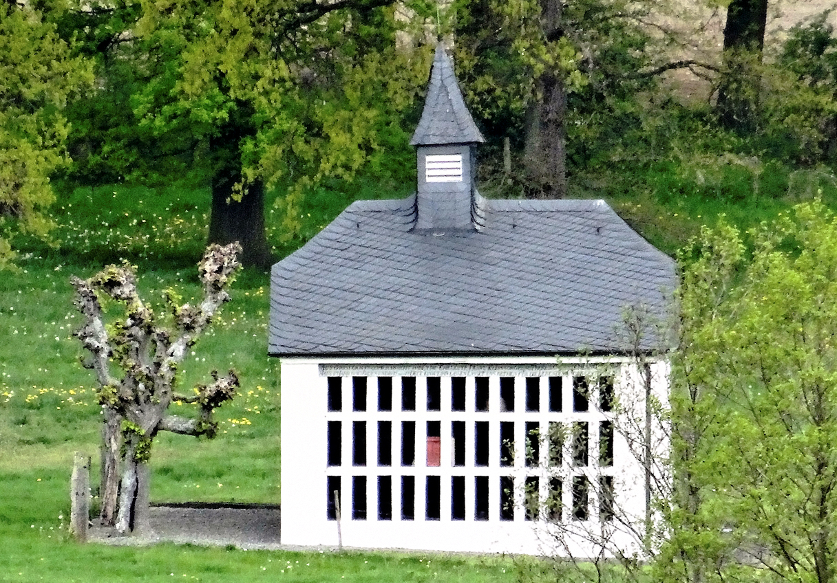 Die St.Elisabeth-Kapelle (auch bekannt als Bienenstockkapelle) auf dem Lohof in Reiste, einem Ortsteil von Eslohe im Hochsauerlandkreis (Nordrhein-Westfalen)